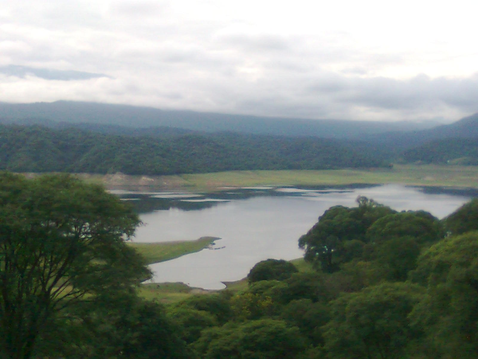 El Dique-Embalse Escaba se encuentra rodeado por cerros y sierras del sur tucumano, la vegetación pertenece al ecosistema de las Yungas, por lo cual es muy rica y numerosa. Este Lugar es de gran interés y potencial Turístico para toda la Región del Norte.